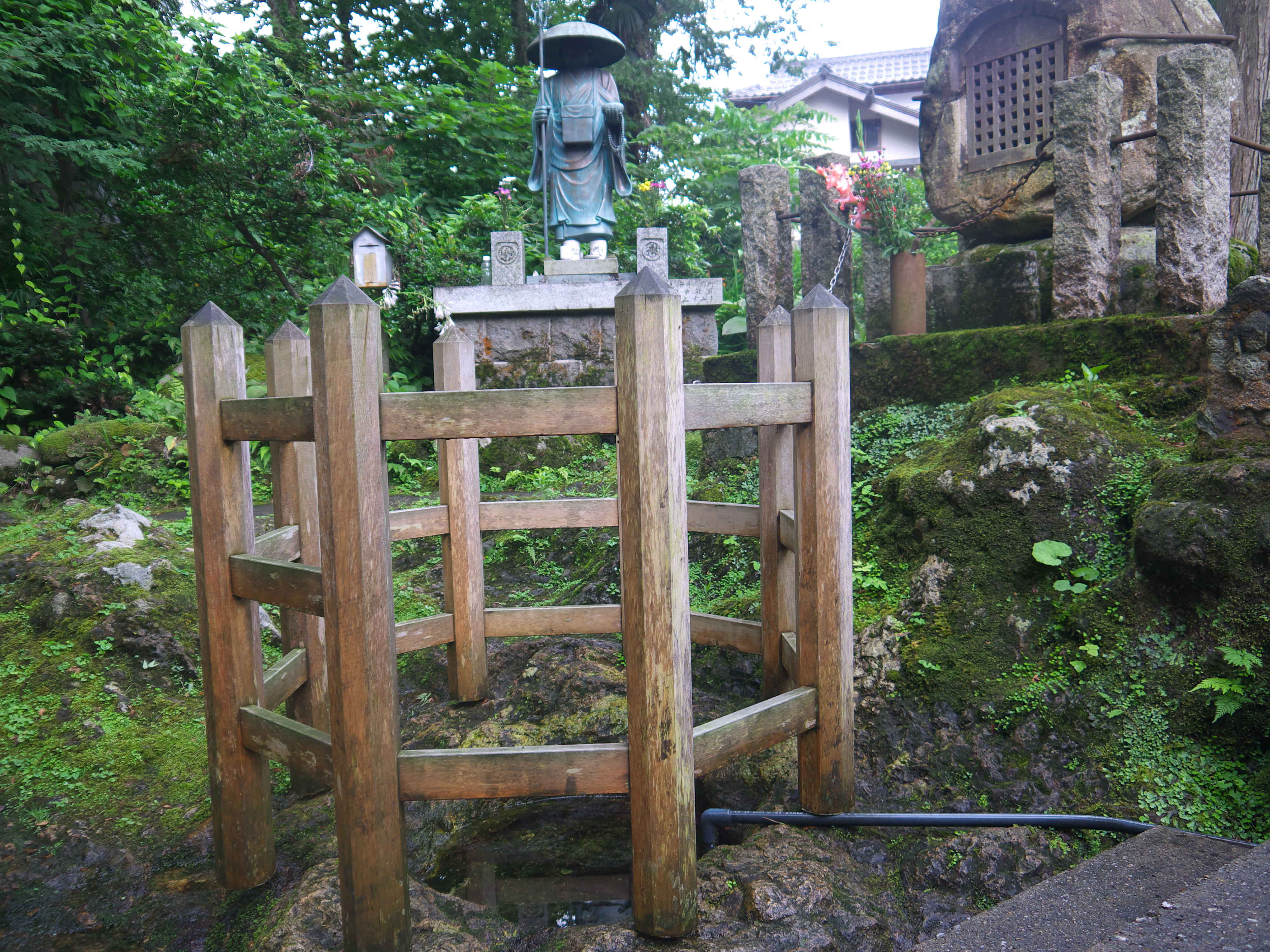 弘法池の全体図